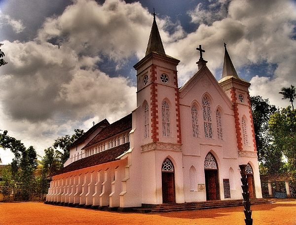 നിരണം സൈന്റ് മേരീസ് പള്ളി